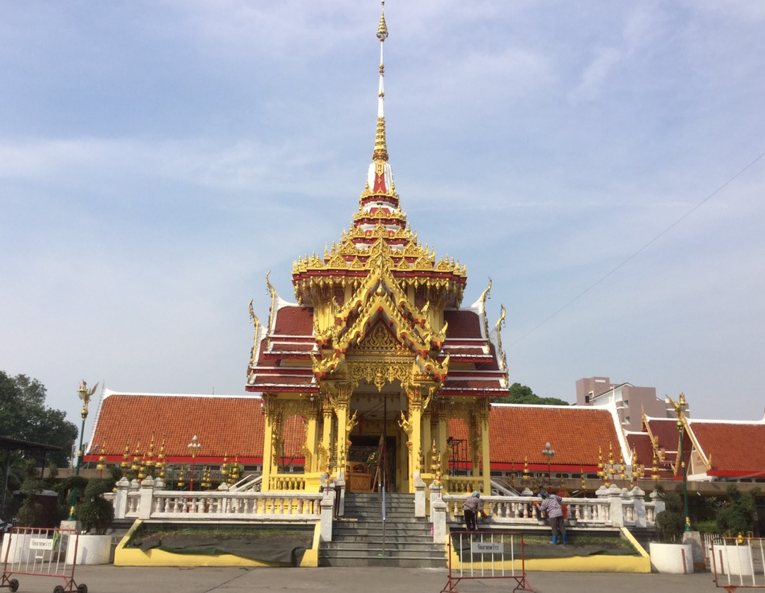 เมรุวัดลาดพร้าว2562